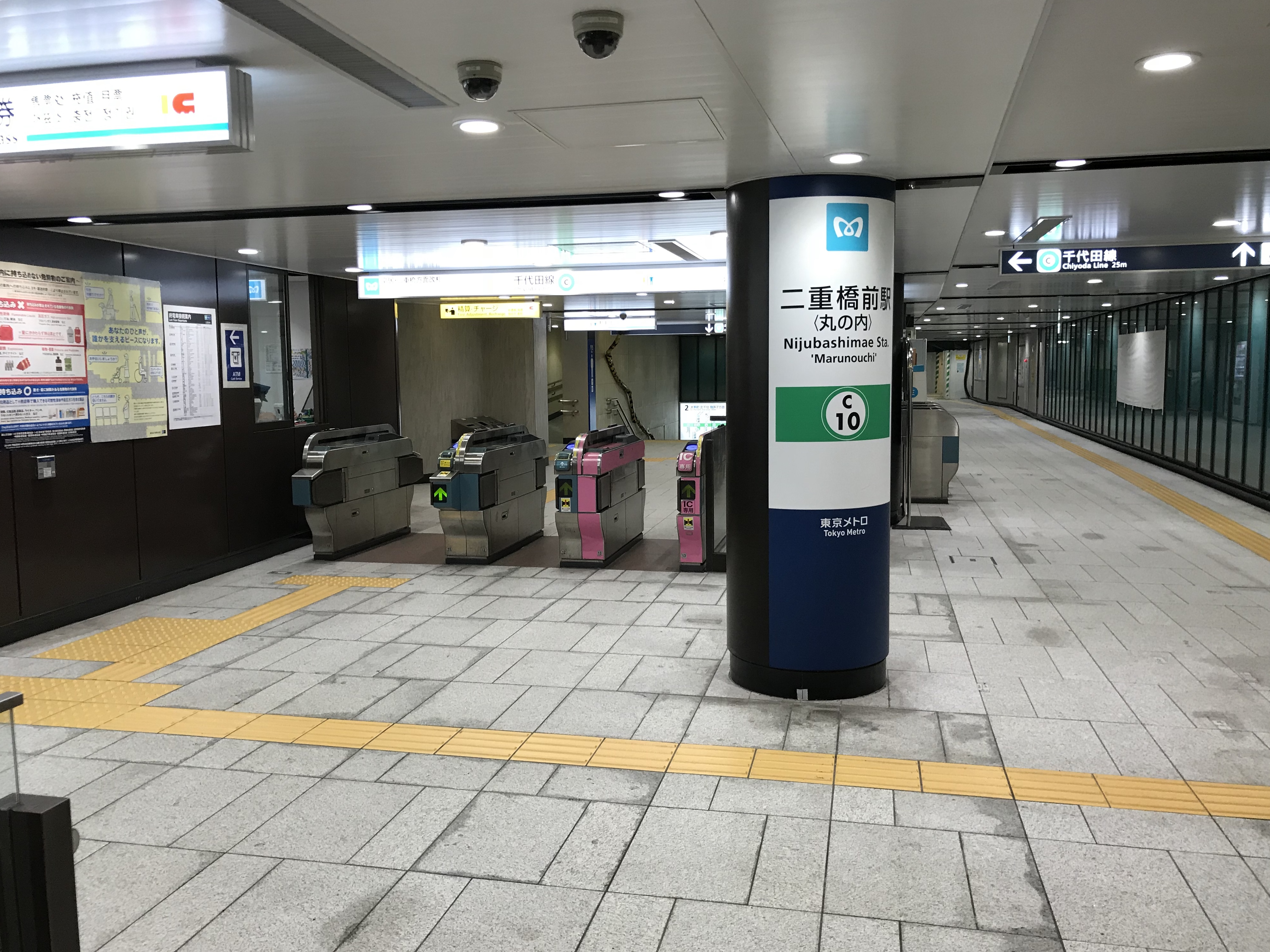 東京メトロ千代田線二重橋前駅皇居・二重橋方面改札口